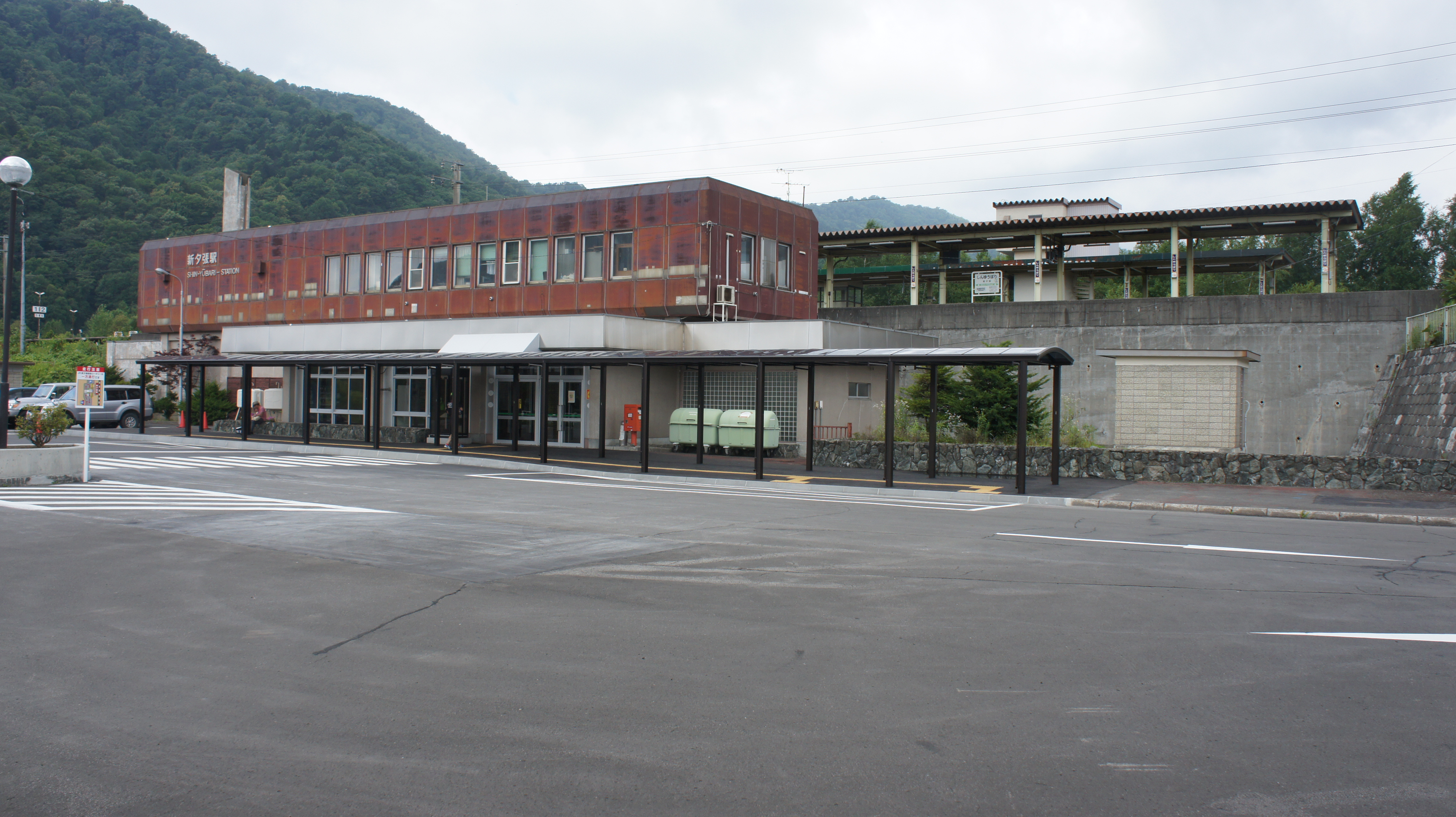 JR石勝線・新夕張駅の駅舎